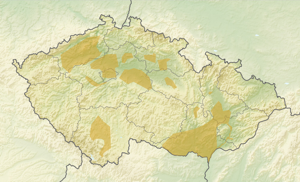 Sídelní oblasti únětické kultury na území České Republiky